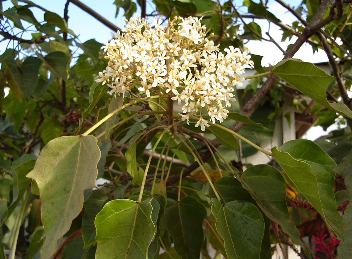 Aleurites moluccana (tuitui) in Tonga, flowering